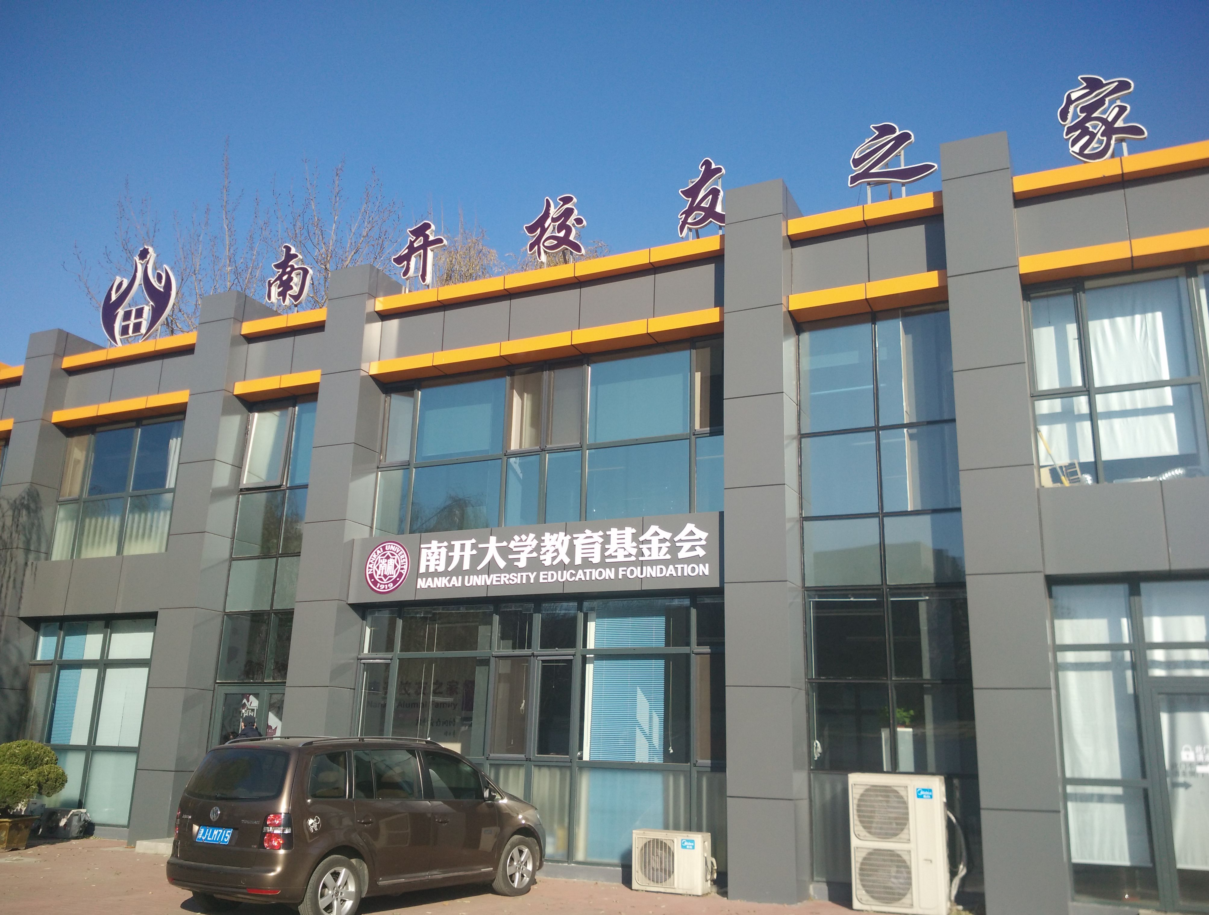 中文（中国大陆）: 南开校友之家，南开大学教育基金会